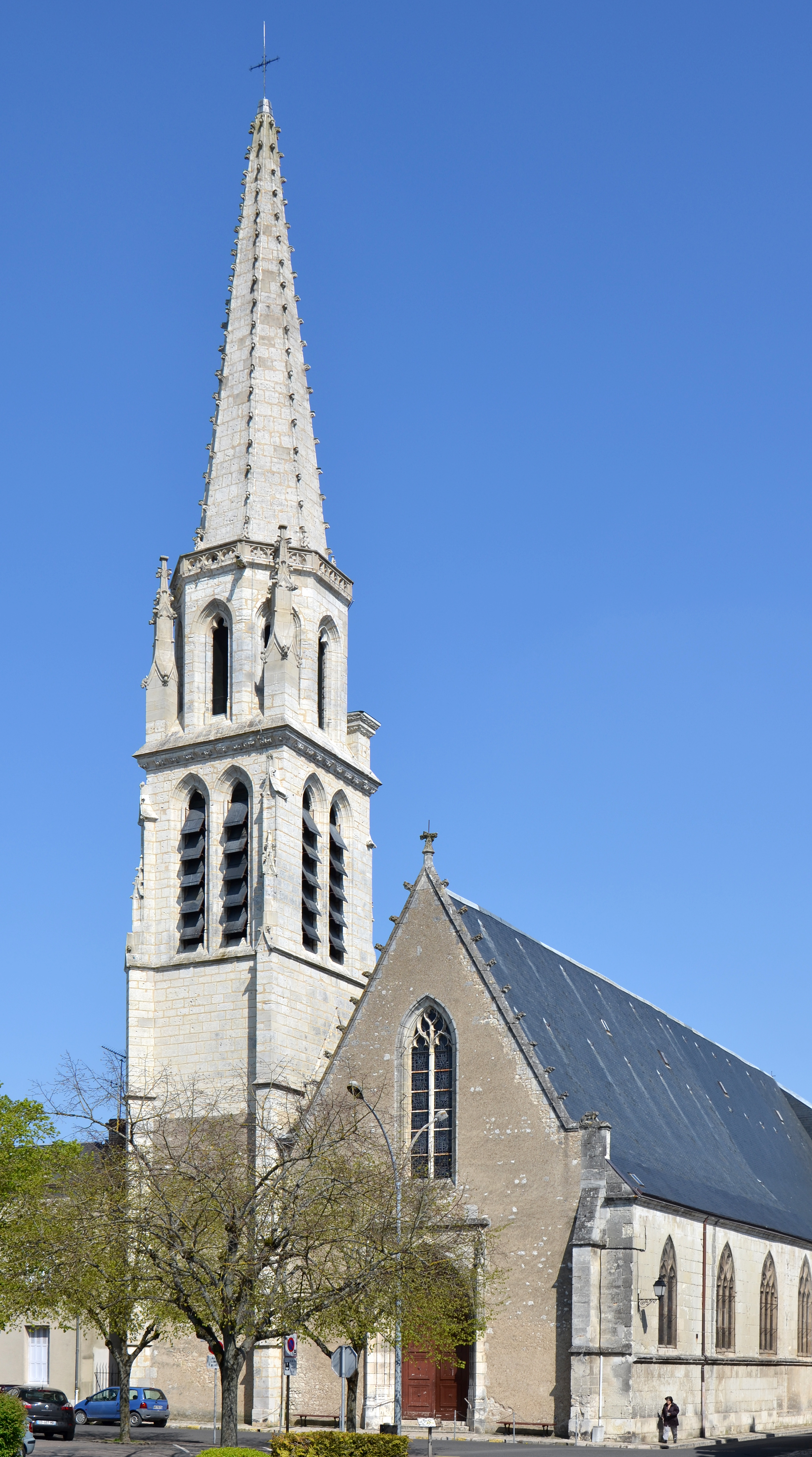 Église Ste-Marie Madeleine, Vendôme, Loir et Cher, France .